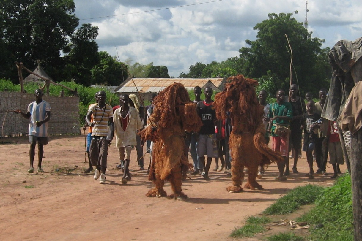 Konkoran (ou kankouran) à Kounkane en Haute-Casamance (Sénégal)